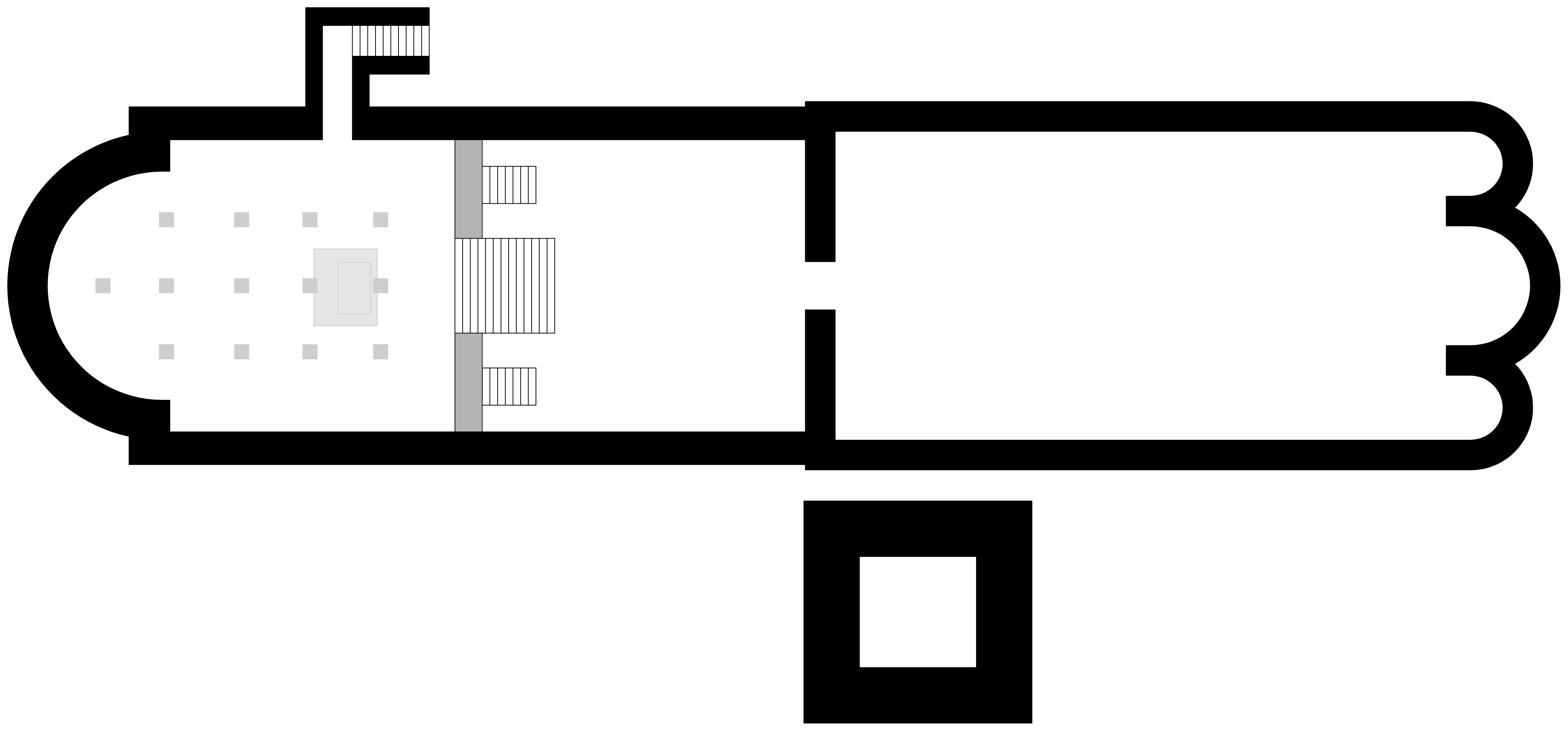 Chiesa II (abbazia di Leno), XI secolo. Fonte: Andrea Breda, L’indagine archeologica nel sito dell’abbazia di S. Benedetto di Leno, Brixia Sacra, 2006, II, p. 118